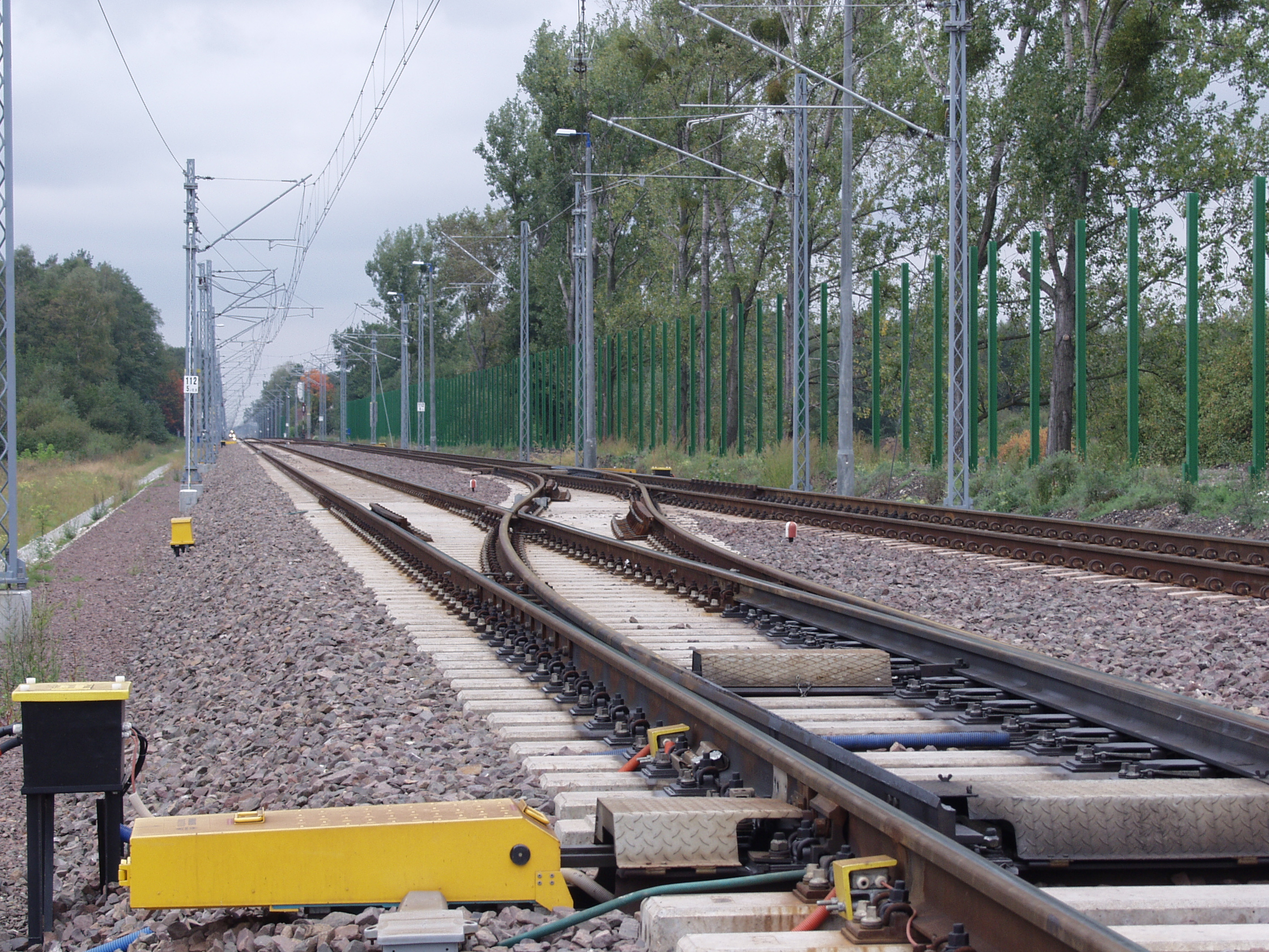 Plik:Przystanek Osobowy Dąbrowa Niemodlińska - układ torowy stacji.